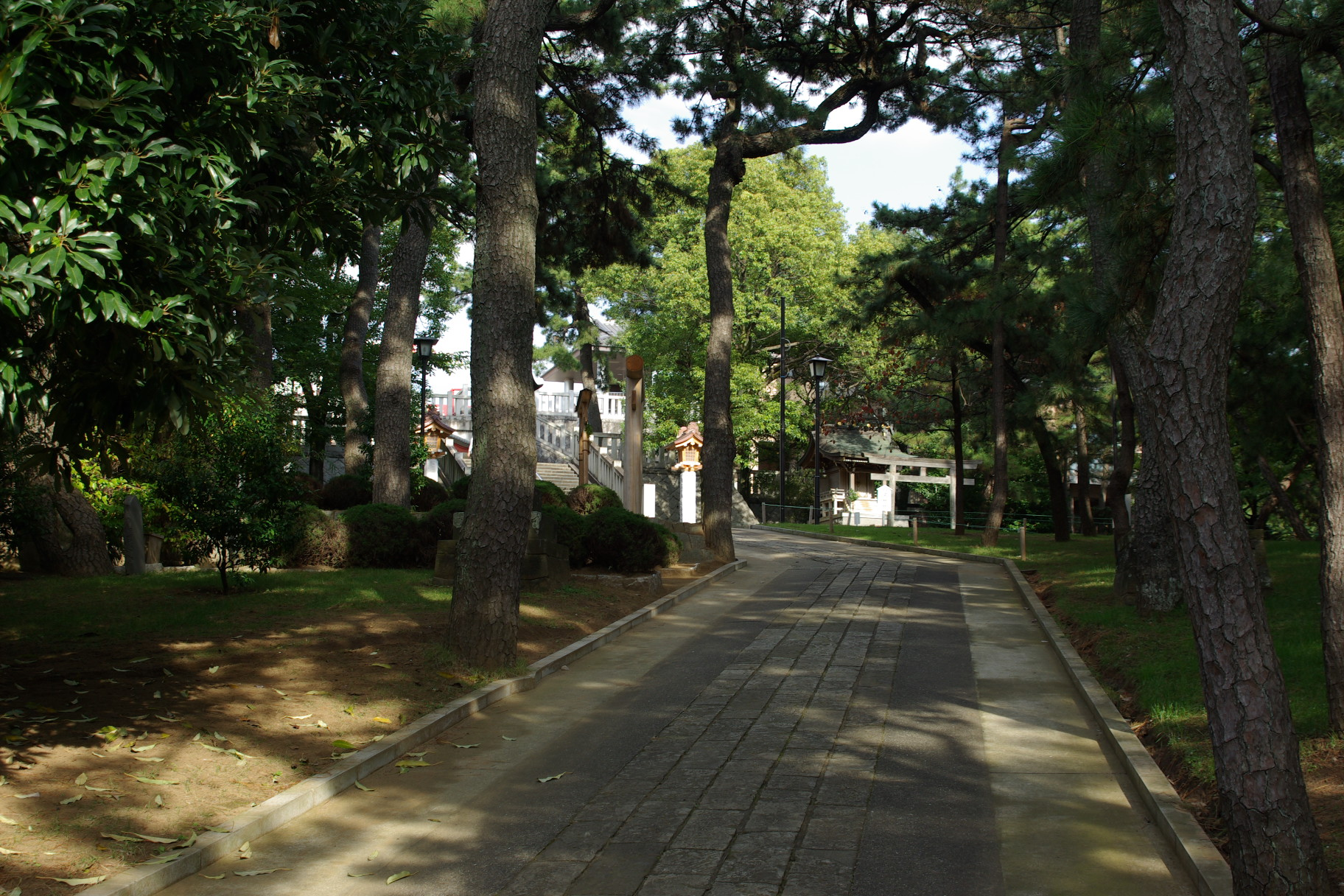 稲毛浅間神社参道